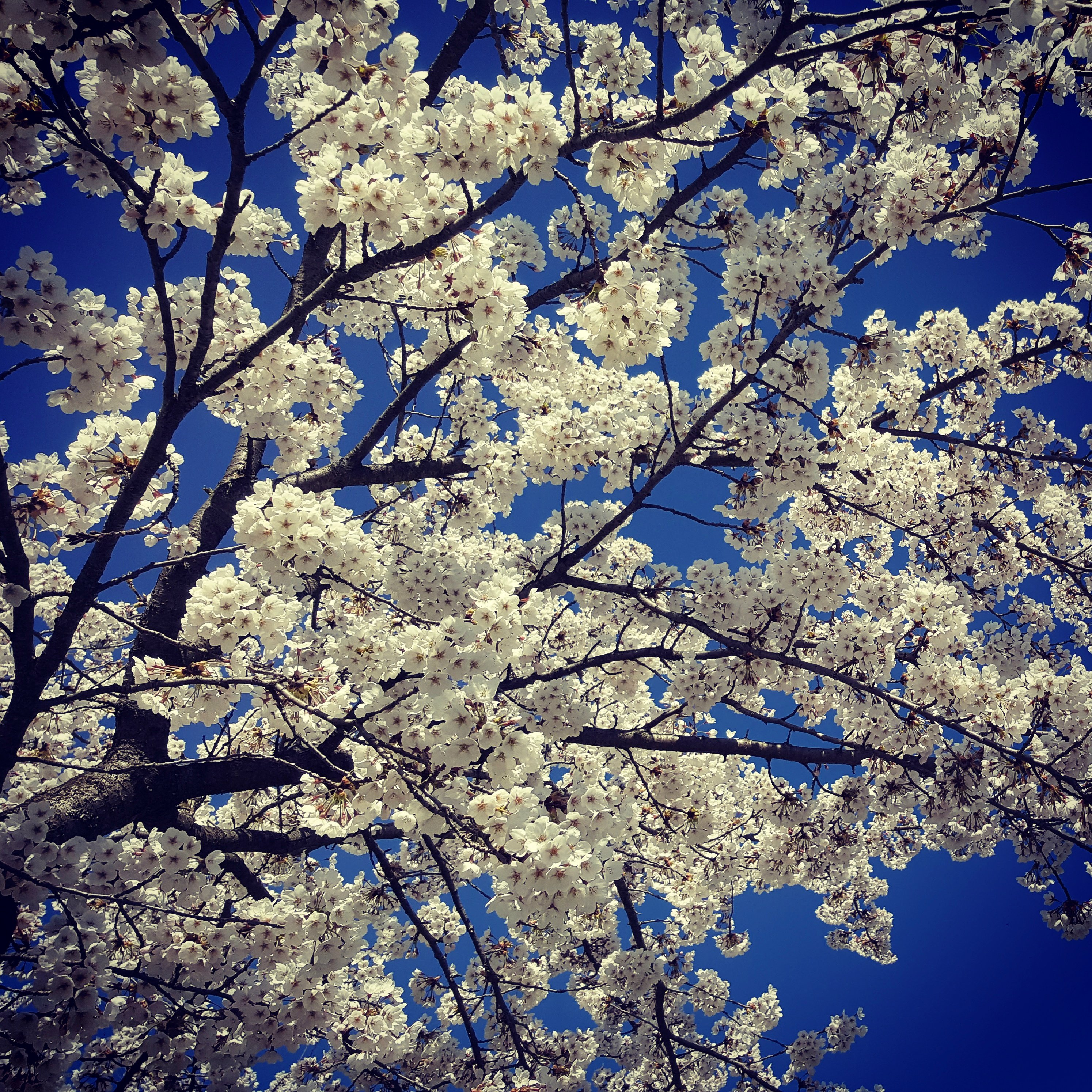 In bloom